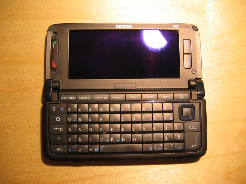 Nokia E90 Communicator Innenansicht